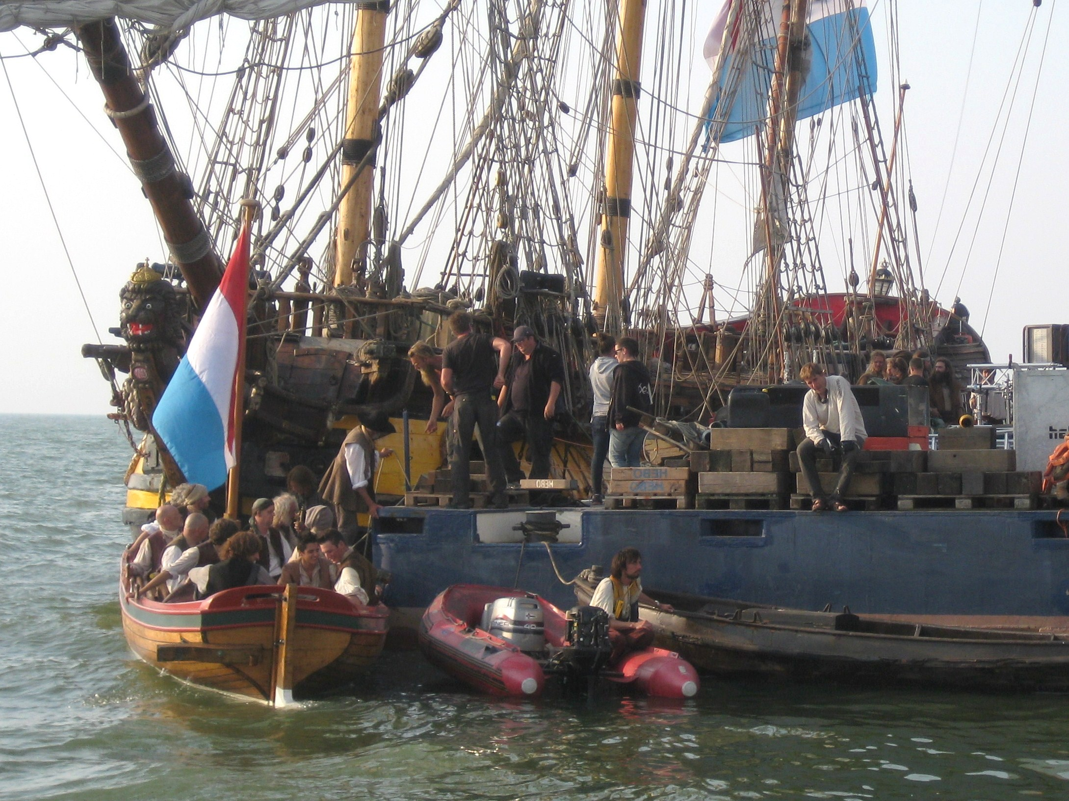 Opnamen van de speelfilm Michiel de Ruyter in het Markermeer bij Lelystad. In het midden met pet regisseur Roel Reiné